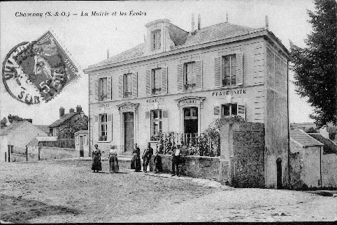 Schule von Chavenay um 1900, heute das Rathaus der Gemeinde